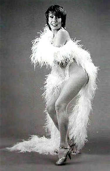 Gogó Rojo- actriz y vedette